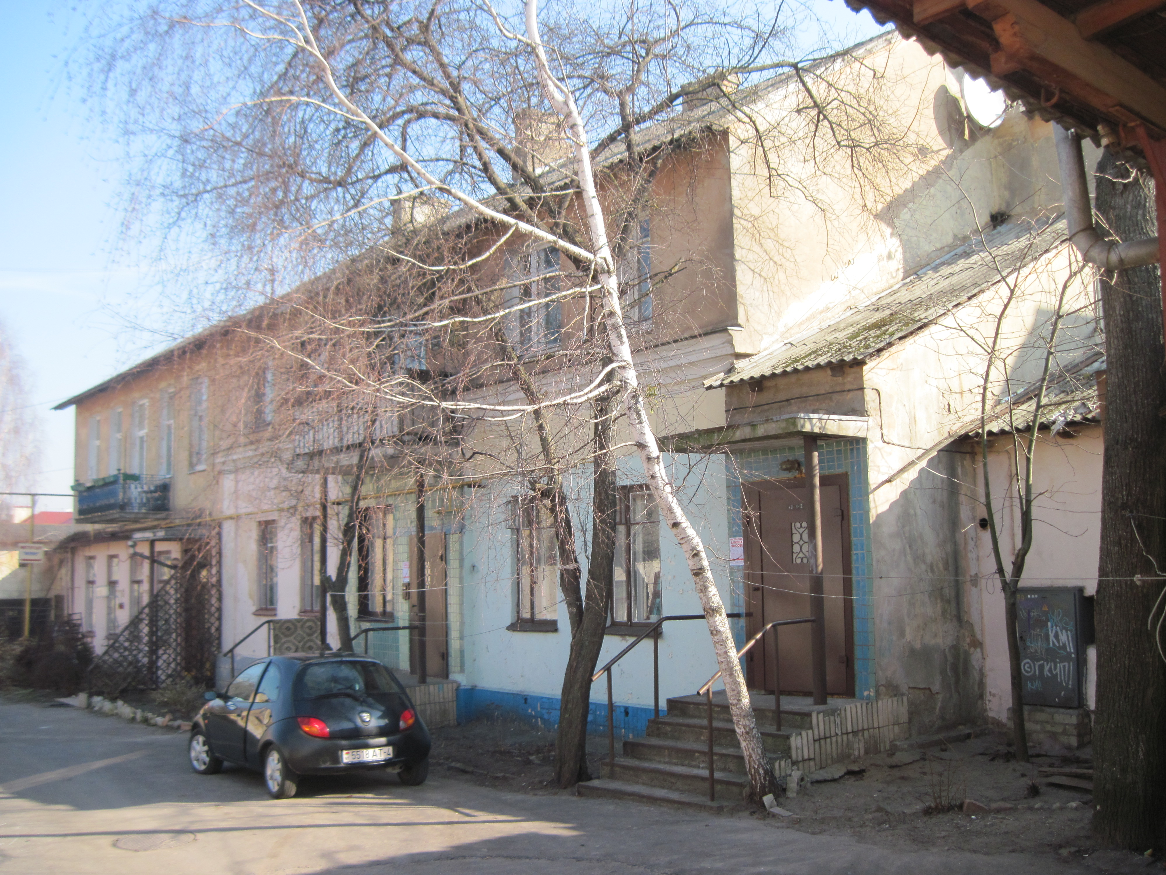 Беларуская (тарашкевіца): Забудова гістарычнага цэнтра Гродна. Вуліца К. Маркса, 28/3